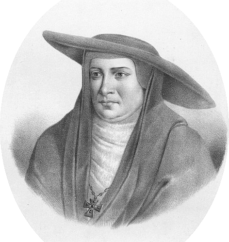 Fryderyk Jagiellończyk primate of Poland